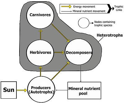 Maila trofikoen taxonomia